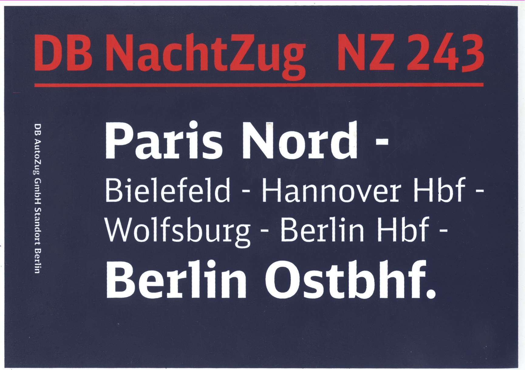 Zuglaufschild des Nachtzuges NZ243 von Paris nach Berlin der DB Autozug GmbH